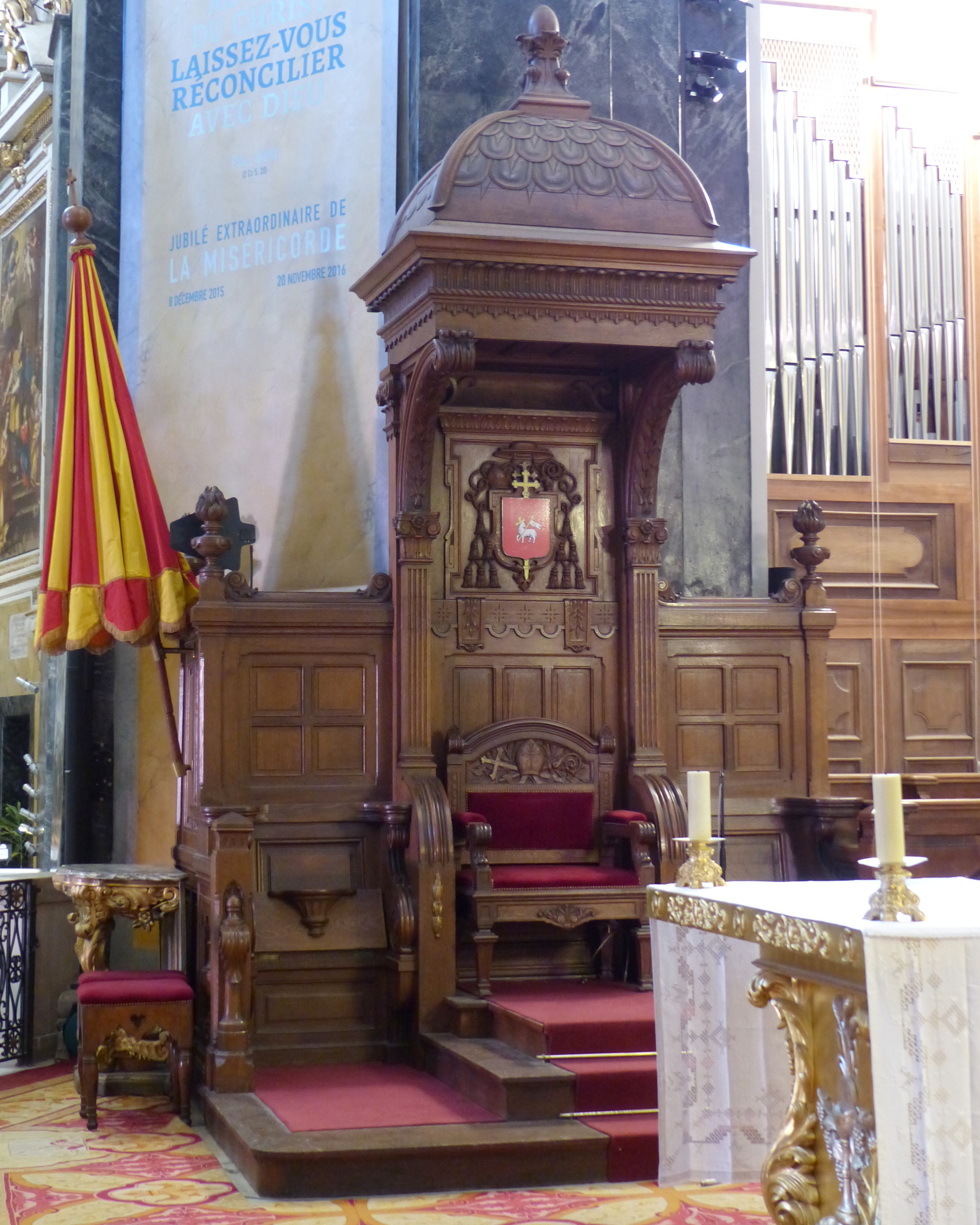 Nice (Alpes-Maritimes, France), cathédrale Ste Réparate, dans l'abside médiane, le chœur ou plutôt le sanctuaire; ombrellino basilical et cathèdre ou trône épiscopal.